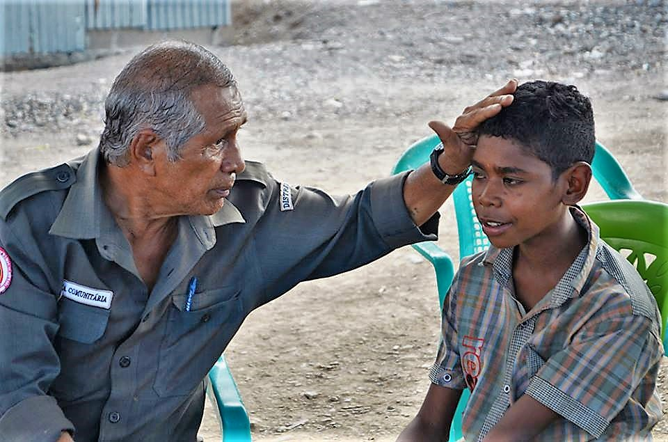 Eurico da Costa de Jesus, Suco-Chef von Comoro